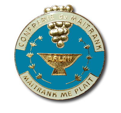 Médaille des Compagnons, Échansons ou Grand-Échansons de la Confrérie du Maitrank d'Arlon (ici, médaille de Marie-Louise Bergans-Goffin). Inscription : « CONFRERIE du MAITRANK — MAITRANK ME PLAIT ».